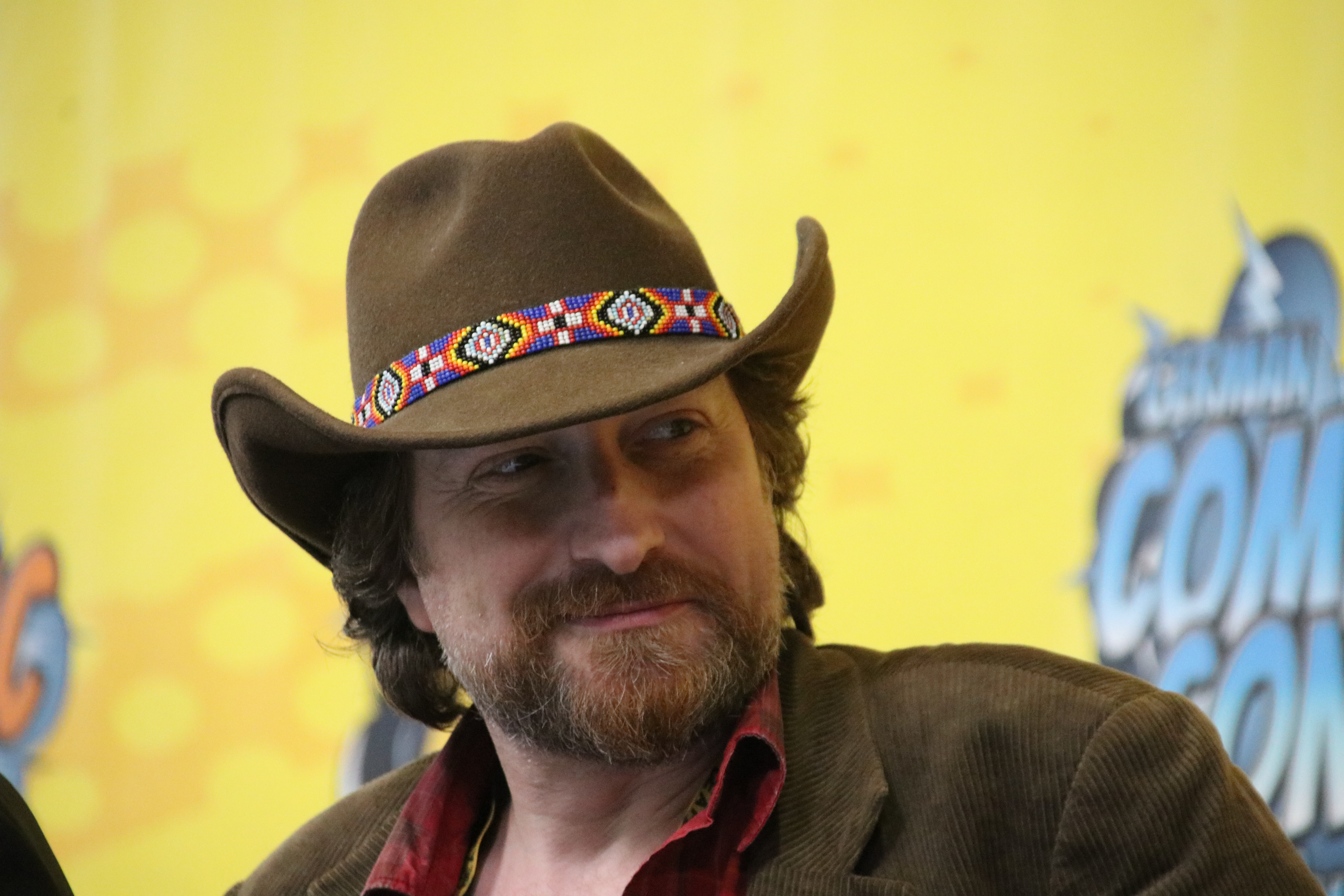 Ralf David beim Panel der German Comic Con 2019 in Berlin